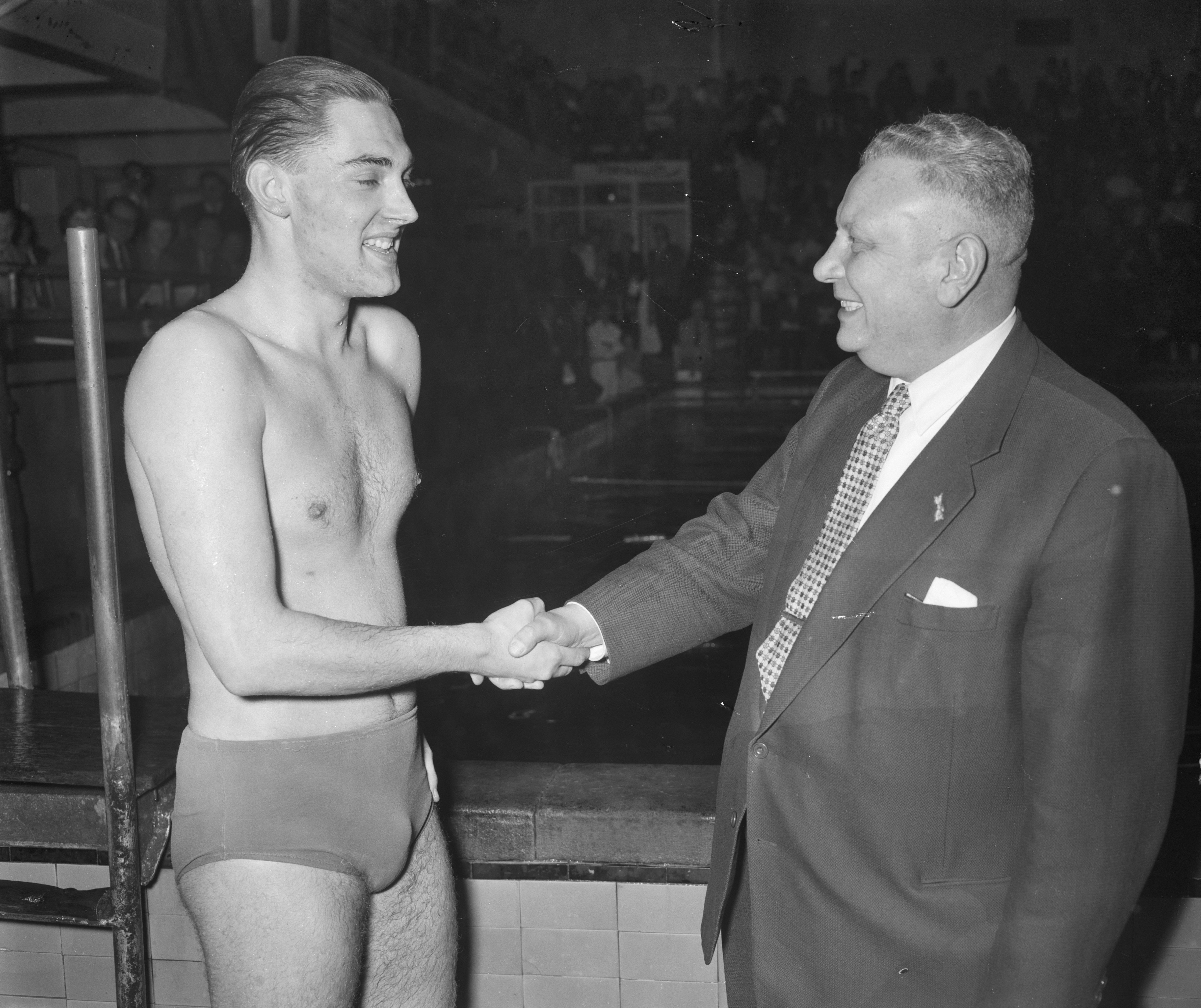 Collectie / Archief : Fotocollectie Anefo Reportage / Serie : [ onbekend ] Beschrijving : Zwemwedstrijden Hauserbeker nieuw record 100 meter rug . Jan de Vries (voorzitter) Swijghuizen (zwemmer) Datum : 2 maart 1957 Trefwoorden : RECORDs, ZWEMWEDSTRIJDEN, voorzitters Persoonsnaam : Jan de Vries Fotograaf : Noske, J.D. / Anefo Auteursrechthebbende : Nationaal Archief Materiaalsoort : Negatief (zwart/wit) Nummer archiefinventaris : bekijk toegang 2.24.01.04 Bestanddeelnummer : 908-3672